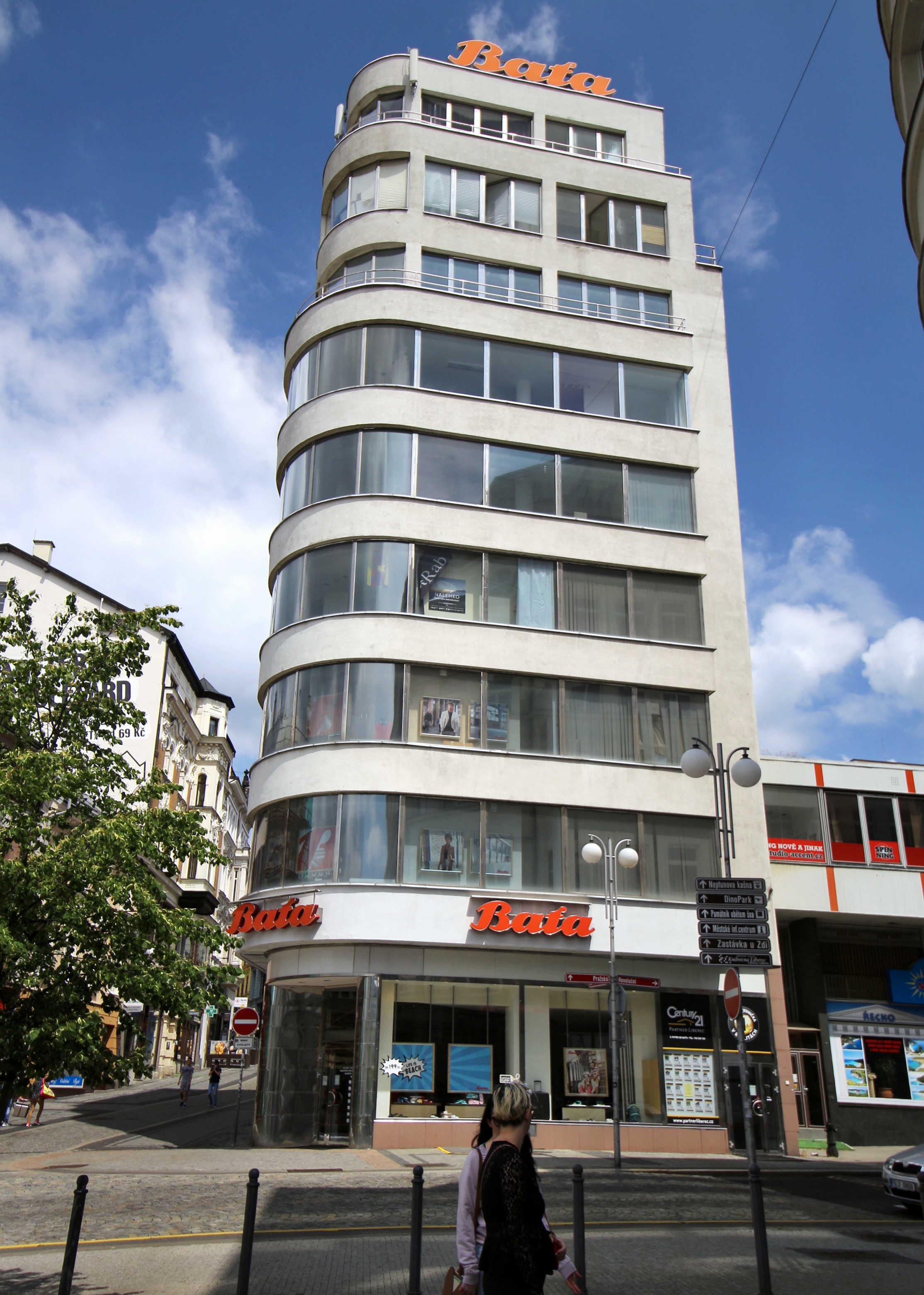 Obchodní dům Baťa v Liberci